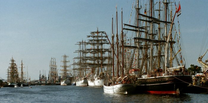 Sail 2000 in Bremerhaven Motiv: Windjammer auf der Sail 2000 in Bremerhaven Foto: Wilfried Wittkowsky, 2000